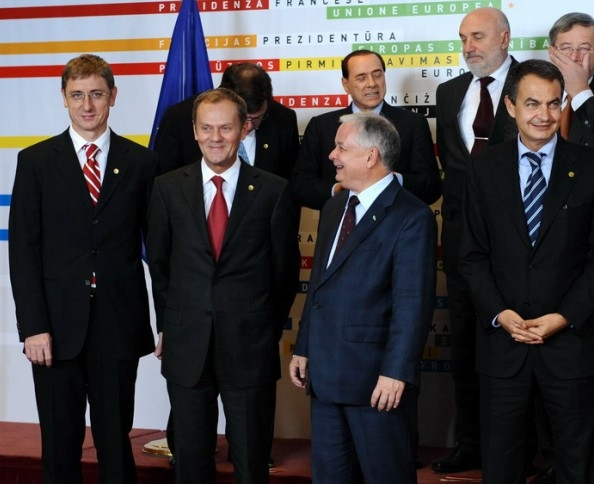 Wspólne zdjęcie uczestników szczytu Rady Europejskiej, 15 października 2008